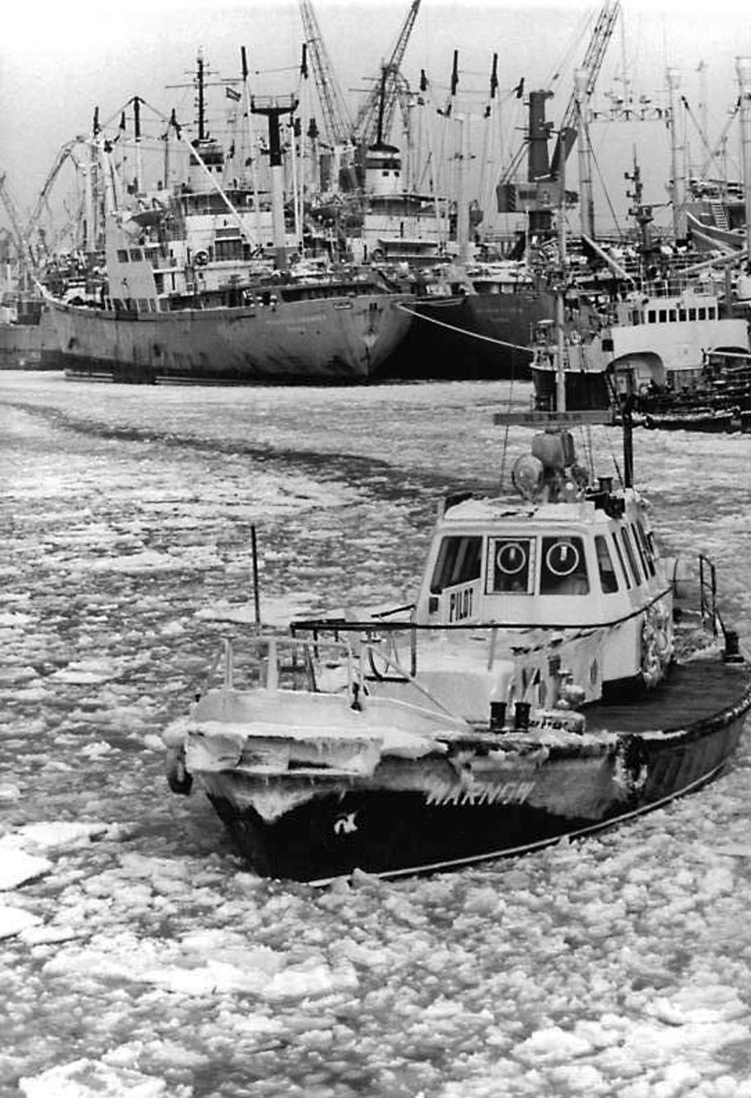 Rostock, Hafen, Lotsenversetzboot, Winter ADN-ZB Sindermann 10.1.85 Rostock: Umschlag bei Eis und Schnee-Eisdicken bis zu 15 Zentimeter Stärke werden gegenwärtig auf den Seewasserstraßen an der DDR-Ostseeküste gemessen. Der Einsatz eisbrechender Schlepper der Bagger-, Bugsier-, und Bergungsreederei wird von der zentralen Eisbrecherleitstelle des Seefahrtsamtes wird von der zentralen Eisbrecherleitstelle des Seefahrtamtes der DDR koordiniert, um in- und ausländischen Schiffen die Zufahrt zu den Seehäfen, wie im Rostocker Überseehafen zu ermöglichen. Hier ist das Lotsenversetzboot "Warnow" im Hafenbecken des Rostocker Umschlagplatzes im Einsatz.